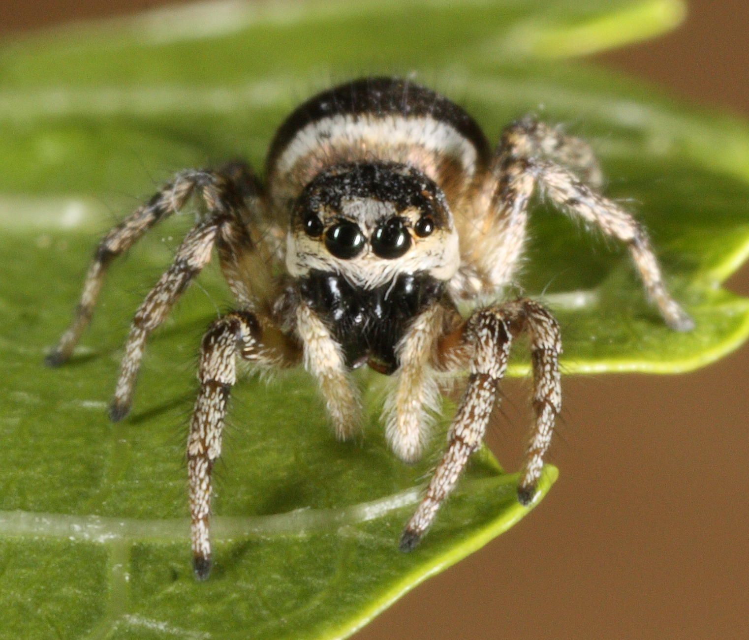 Sebraedderkopp Salticus scenicus hunn sett forfra. De har godt syn og bedømmer avstander bra. Template:Byline